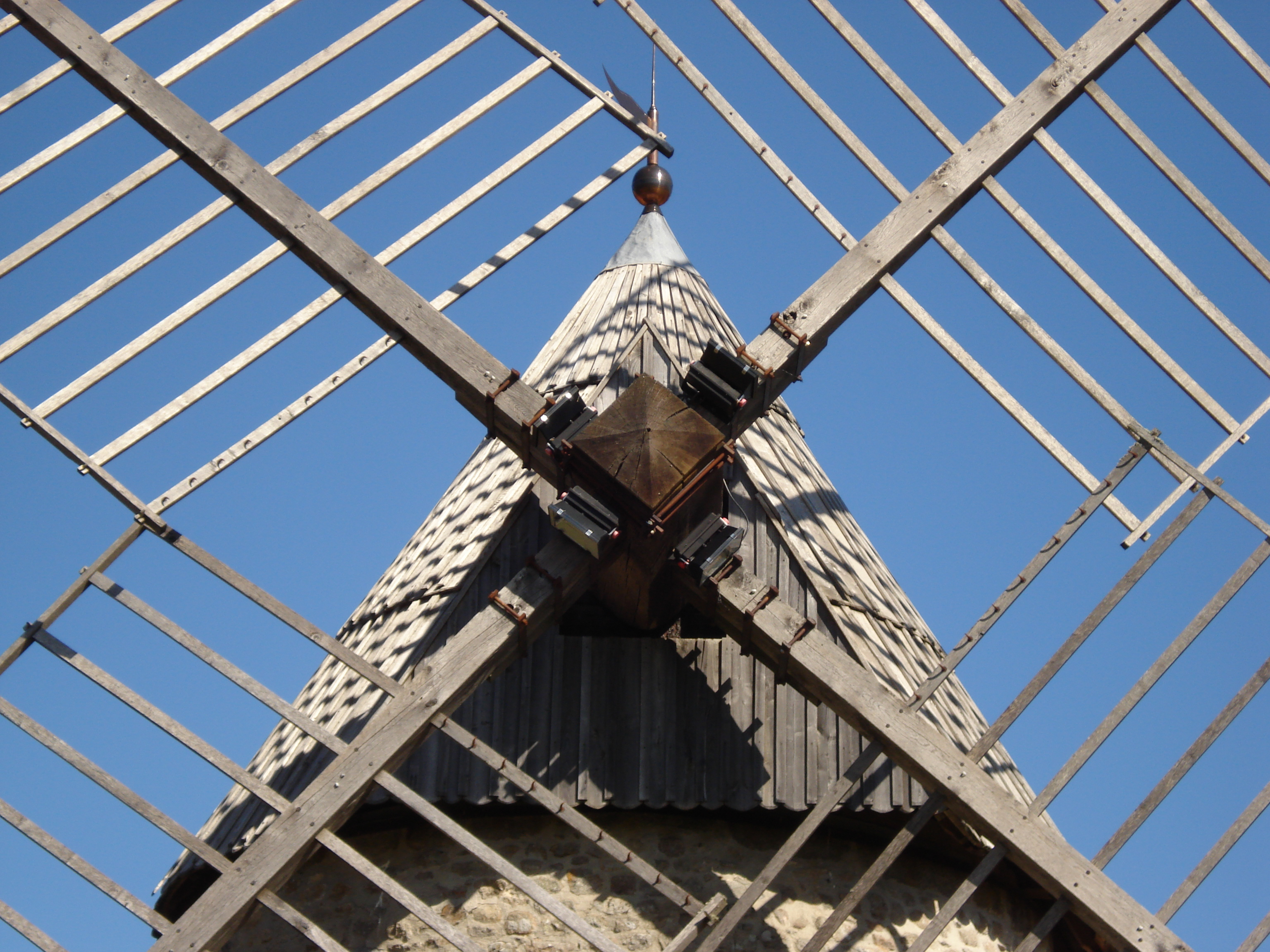 Le seul moulin à vent de corrèze